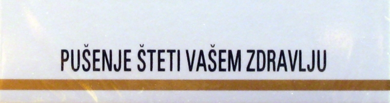 Natpis upozorenja na kutiji cigareta za hrvatsko tržište u 2008. godini